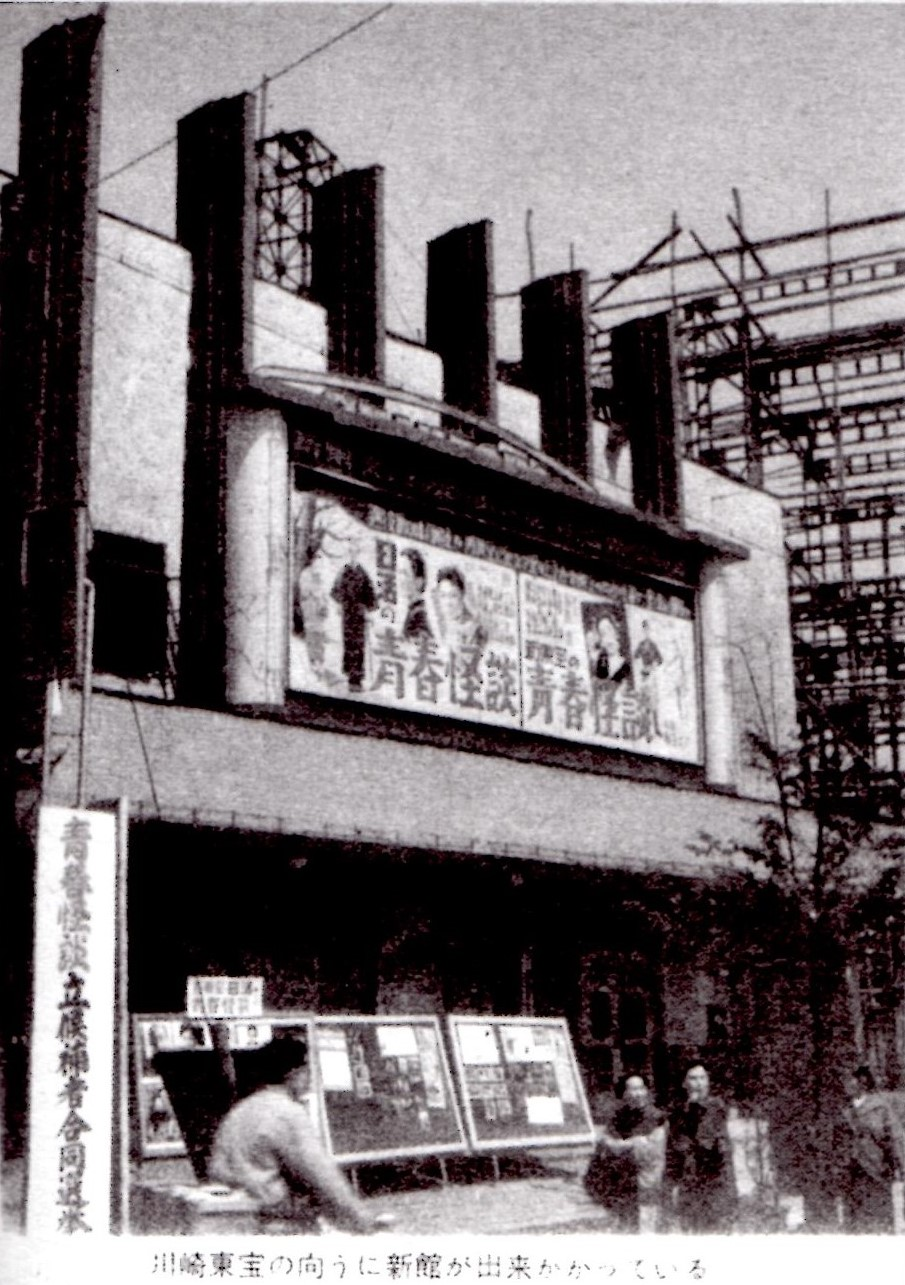 神奈川県川崎市の映画館「川崎東宝」。